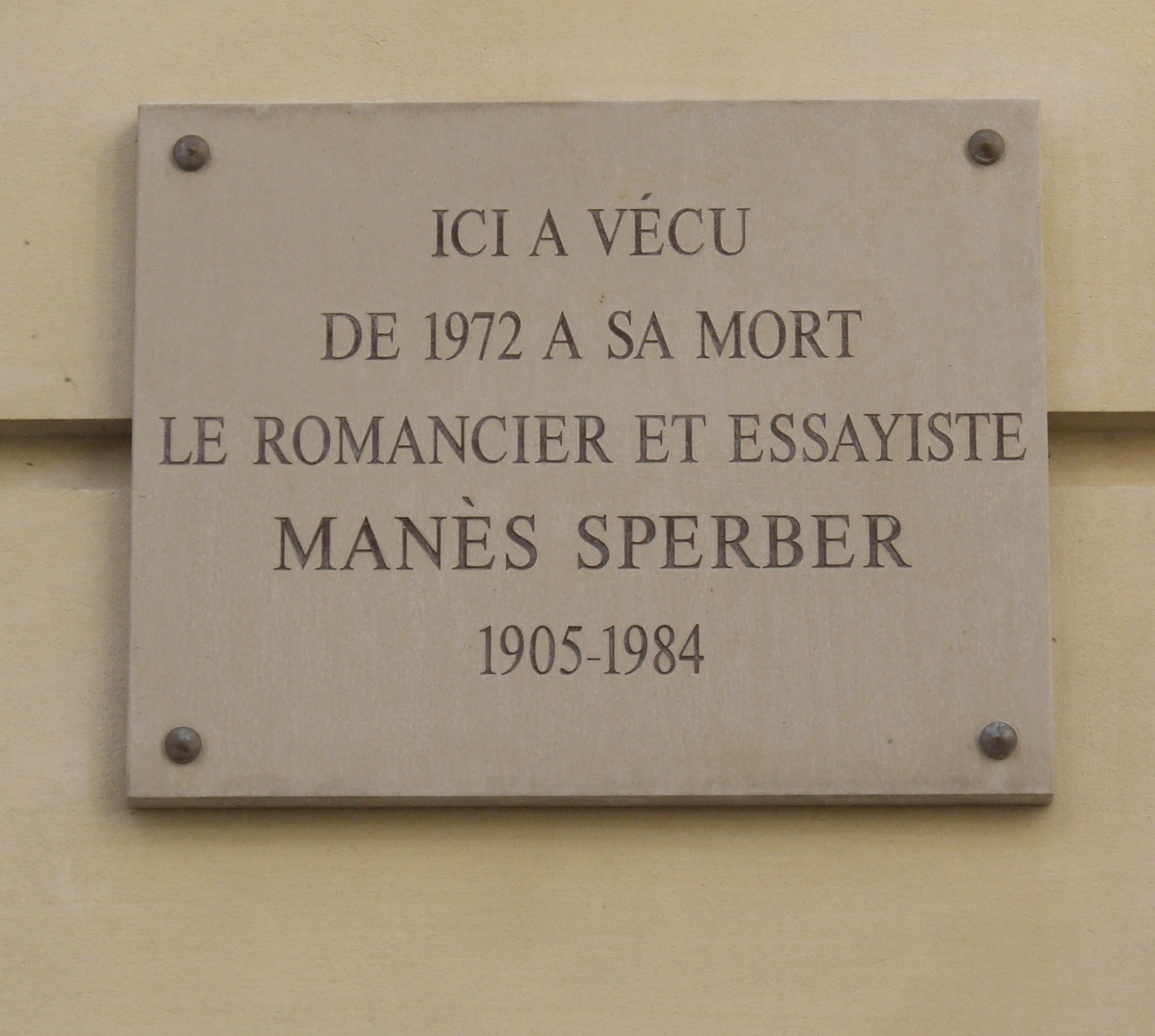 Plaque commémorative, 83 rue Notre-Dame-des-Champs, Paris 6e. « Ici a vécu de 1972 à sa mort le romancier et essayiste Manès Sperber, 1905-1984. »